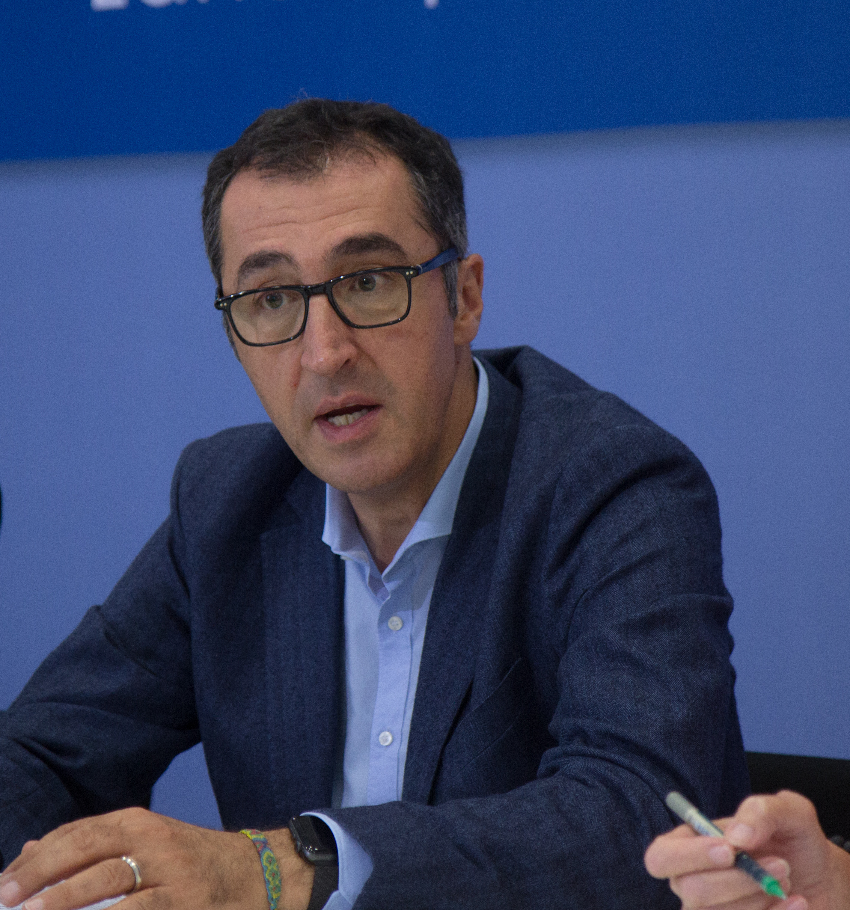 Cem Özdemir am 18. September 2018 im Rahmen einer Pressekonferenz von Bündnis 90/Die Grünen Hessen im Hessischen Landtag. Teilnehmer der Pressekonferenz waren: Cem Özdemir, Tarek Al-Wazir, Priska Hinz und Kai Klose